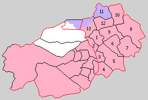 岩手県江刺郡の町村。